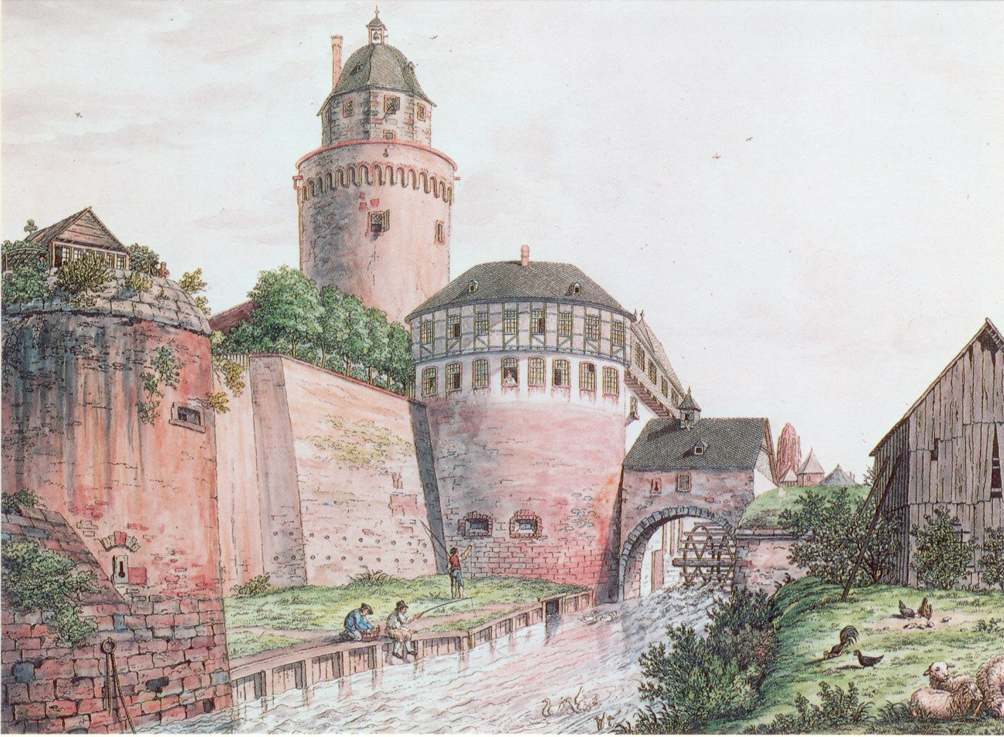 Das Mainzer Bollwerk, südwestliche Bastion der alten Frankfurter Stadtbefestigung. Errichtet 1333-1520, niedergelegt 1809-1818 als letzter Teil der ehemaligen Wallanlagen.